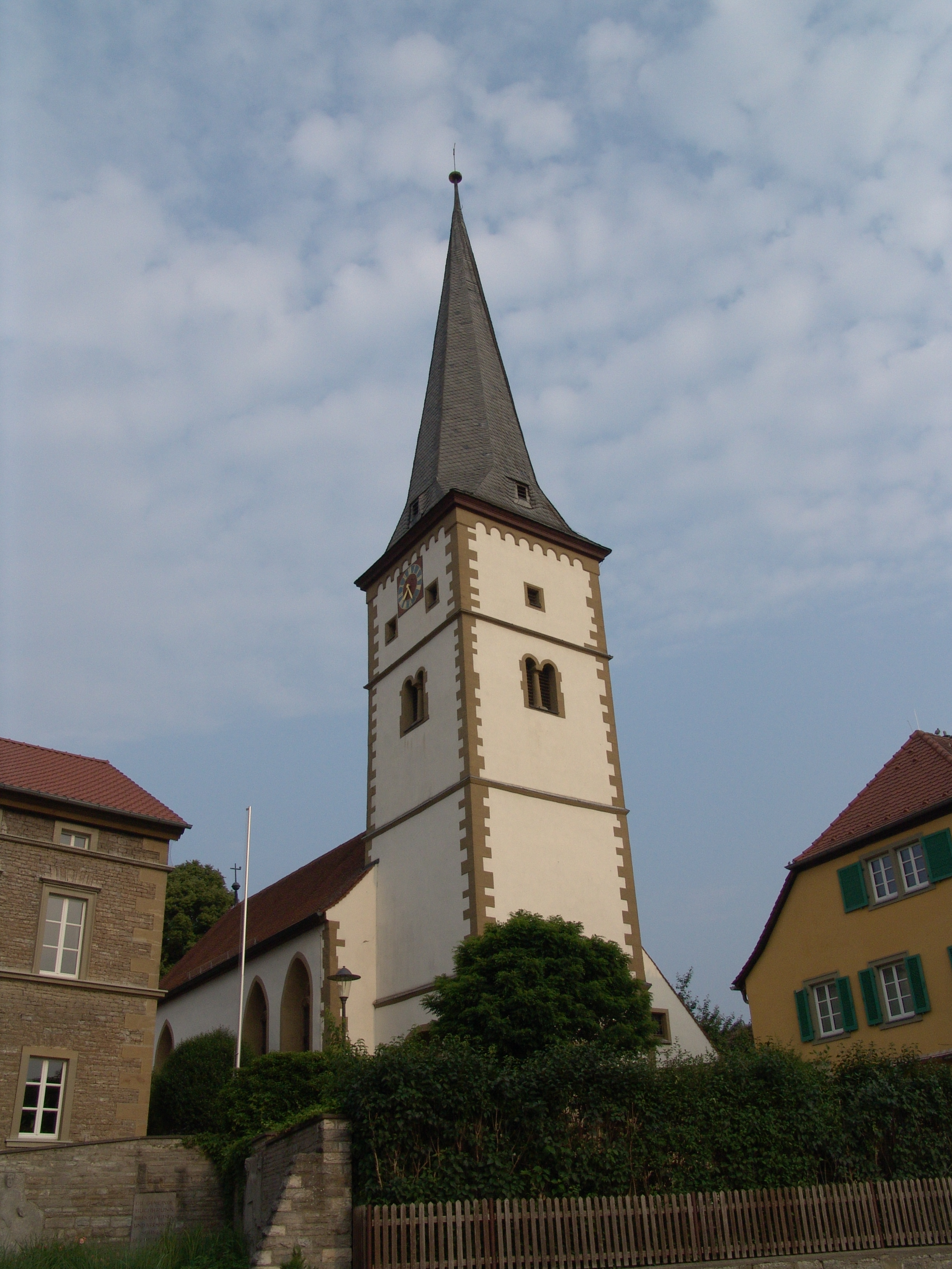 evang.-luth. Kirche St. Maria Magdalena in Buchbrunn